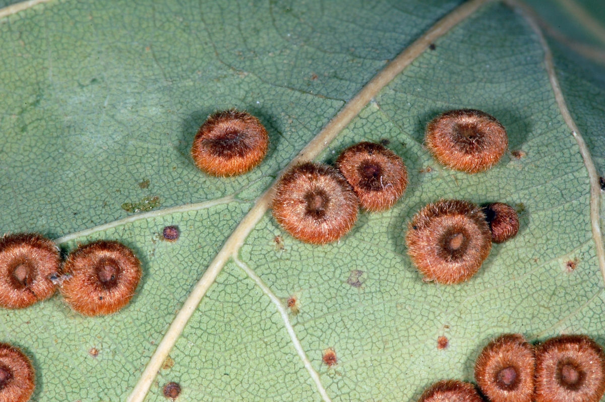 Seidenknopfgalle (Neuroterus numismalis) an Quercus robur, Stromtrasse neben der Startbahn West, Kelsterbach, Hessen, Deutschland